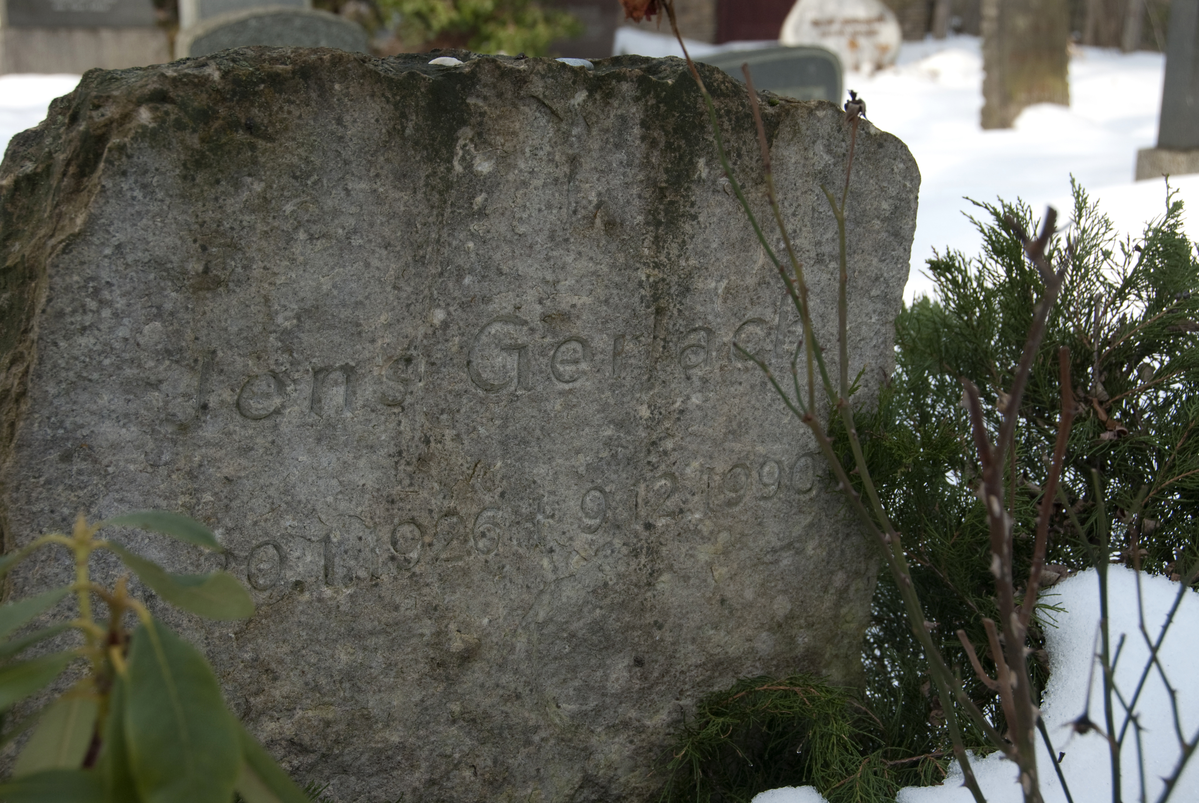 Grabstätte von Jens Gerlach auf dem Friedhof in Petzow